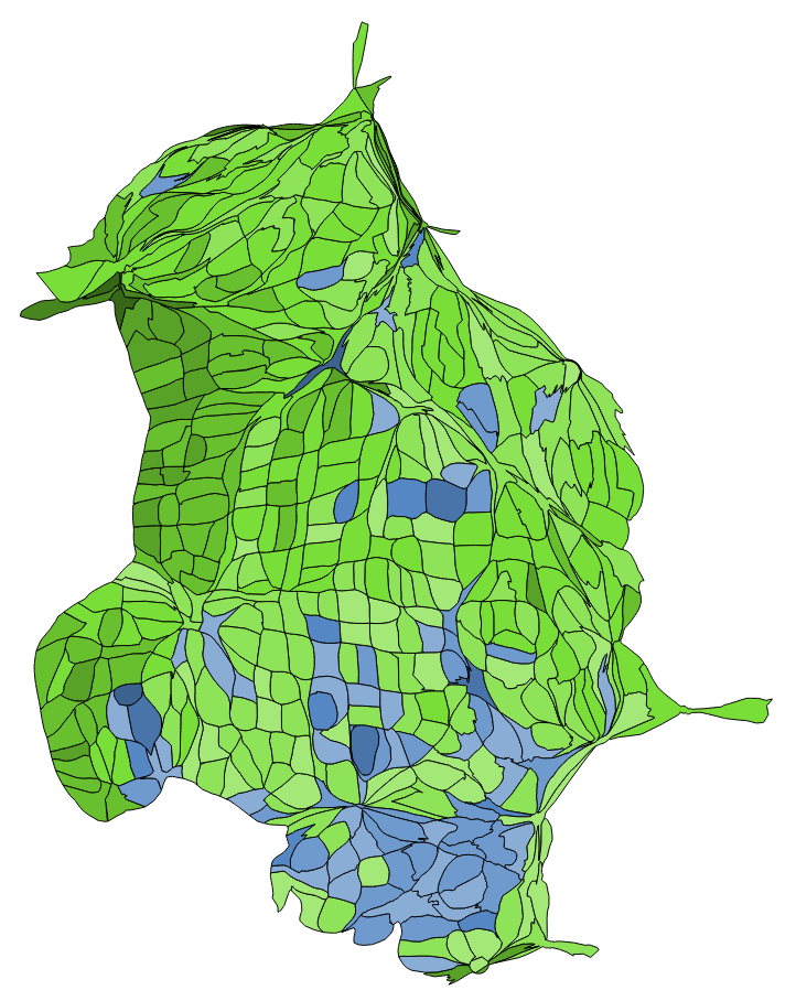 顏色對照表